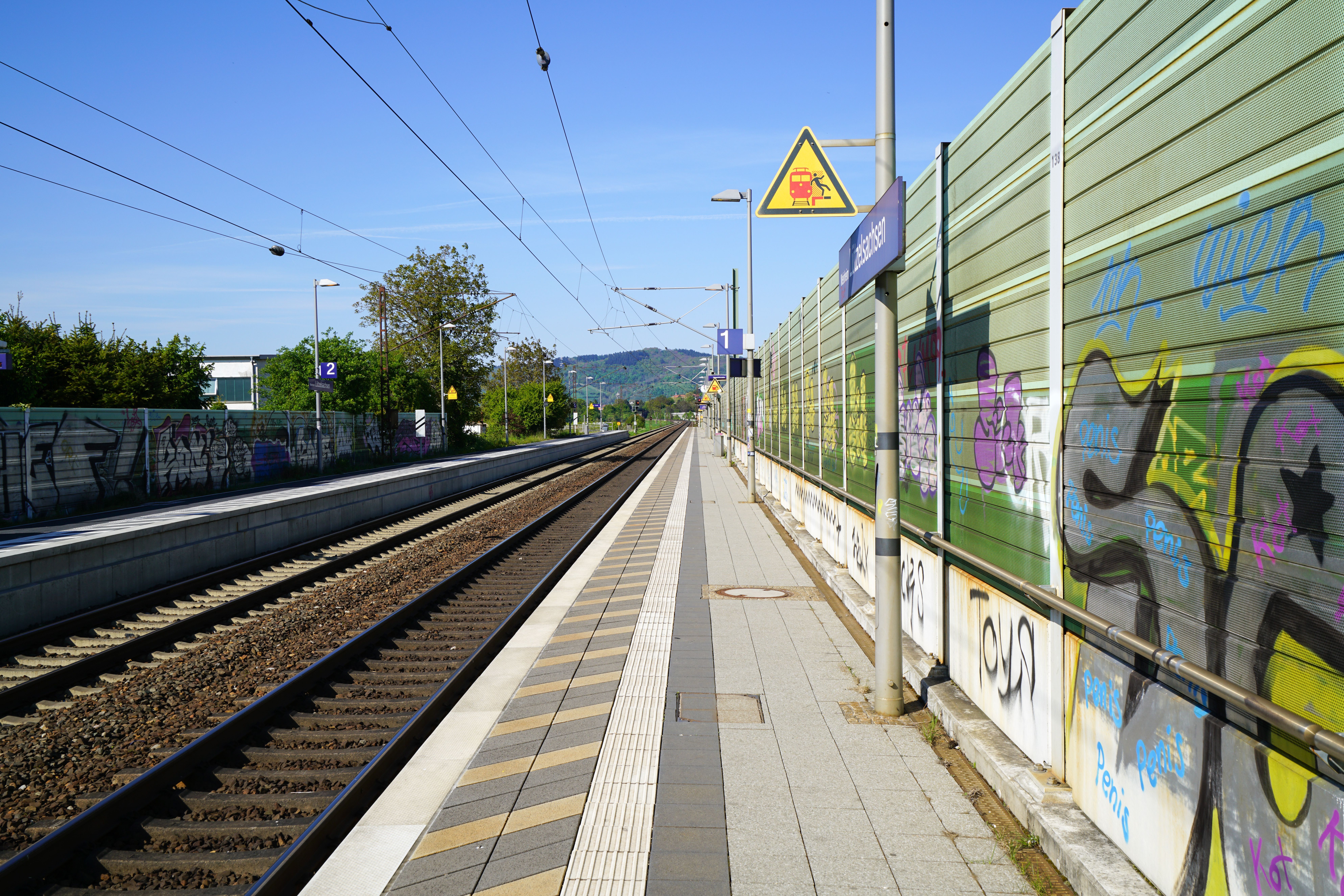 Der Haltepunkt Weinheim-Lützelsachsen in Weinheim an der Main-Neckar-Eisenbahn in Baden-Württemberg